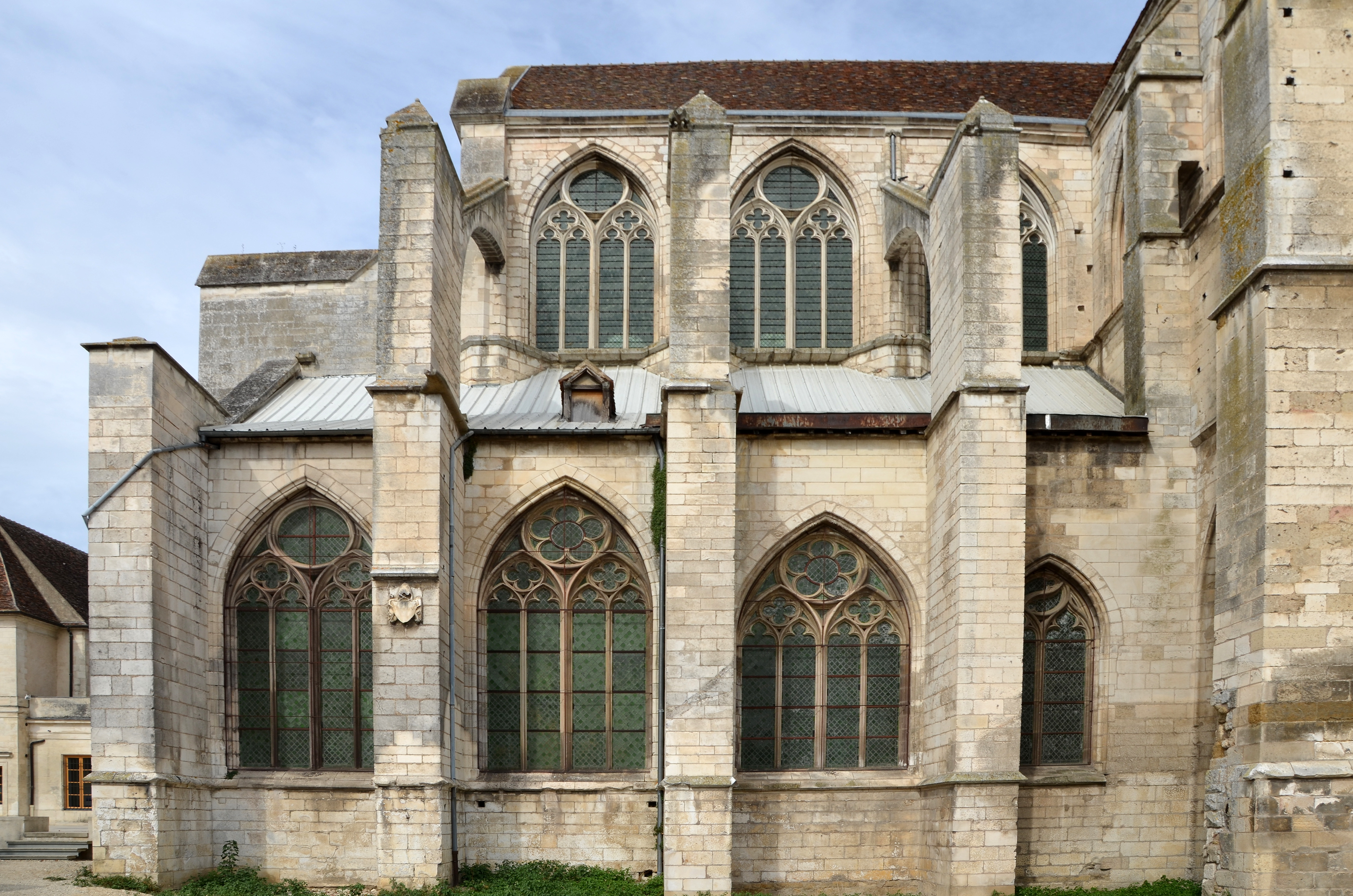 Église abbatiale Saint-Germain à Auxerre, Yonne, Bourgogne, France